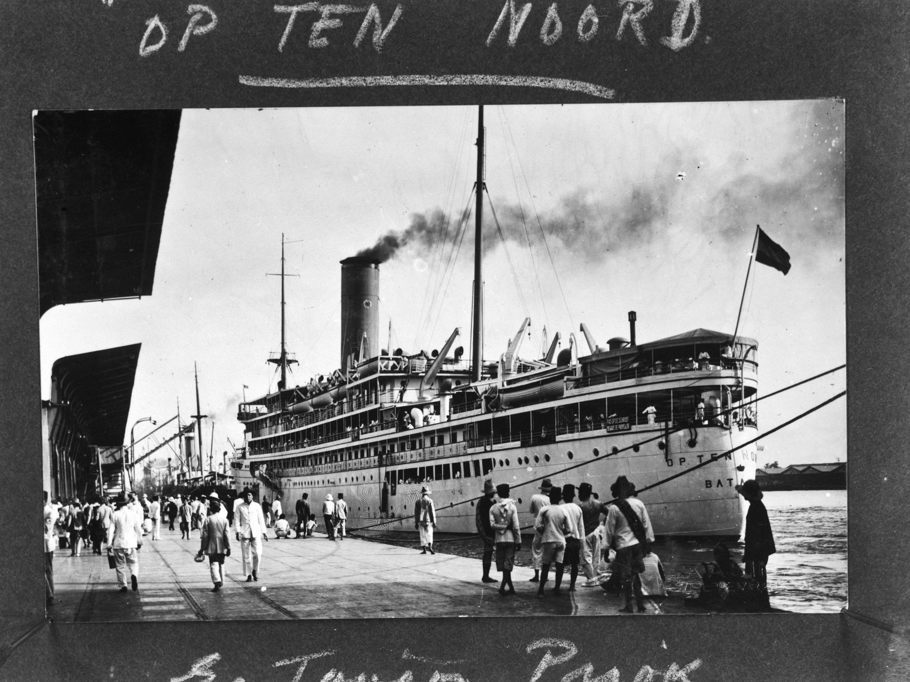 Collectie / Archief : Fotocollectie Anefo Reportage / Serie : NEI [Netherlands East Indies] / Anefo Londen serie Beschrijving : Mailboot SS "Op ten Noord" van de KPM in de haven van Tandjong Priok Datum : 1931 Locatie : Indonesië, Nederlands-Indië, Tanjong Priok Trefwoorden : havens, mailboten, overzeese gebiedsdelen, passagiersschepen, scheepvaart Persoonsnaam : Op Ten Noord Instellingsnaam : KPM Fotograaf : Marsden, Monica Auteursrechthebbende : Nationaal Archief Materiaalsoort : Negatief (zwart/wit) Nummer archiefinventaris : bekijk toegang 2.24.01.04 Bestanddeelnummer : 934-8087 Reacties Geplaatst door Evert Sikkema op 06 februari 2017 - 19:46. Dit in 1927 gebouwde schip kreeg op 28 februari 1942 opdracht om in de Javazee te zoeken naar overlevenden en gewonden van Hr. Ms. De Ruyter, Java en Kortenaer, die bij de slag in de Javazee op 27 februari 1942 tot zinken waren gebracht. Het schip werd echter door de Japanse vloot onderschept en kreeg geen toestemming om nog naar overlevenden van de gezonken Nederlandse schepen te zoeken. Later is het schip door de Japanners in beslag genomen en onder de naam Teno Maru in de vaart gebracht als hospitaalschip/vrachtschip. Op 14 augustus 1945 ging Japan akkoord met de capitulatie, die daarna op 15 augustus plaats vond. Op 2 september werd de onvoorwaardelijke overgave getekend op het Amerikaanse slagschip Missouri. De voormalige Op ten Noort was ondertussen op 23 augustus 1945 opzettelijk door de Japanners tot zinken gebracht om zo te voorkomen dat de roof van de in 1942 tot hospitaalschip verbouwde Op ten Noort als schending van de conventie van Genève zou worden aangemerkt.